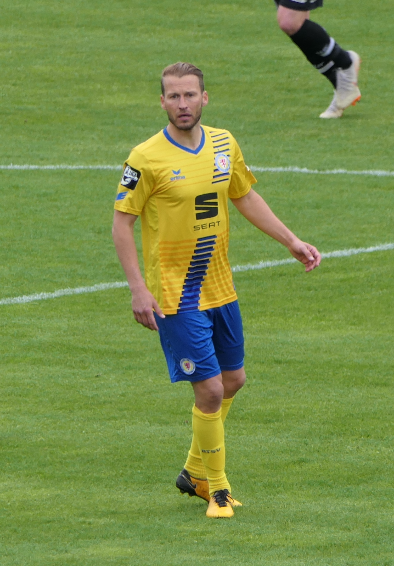 Der Fussballprofi Marc Pfitzner im Trikot von Eintracht Braunschweig beim Auswärtsspiel beim VfR Aalen am 05.05.2019.